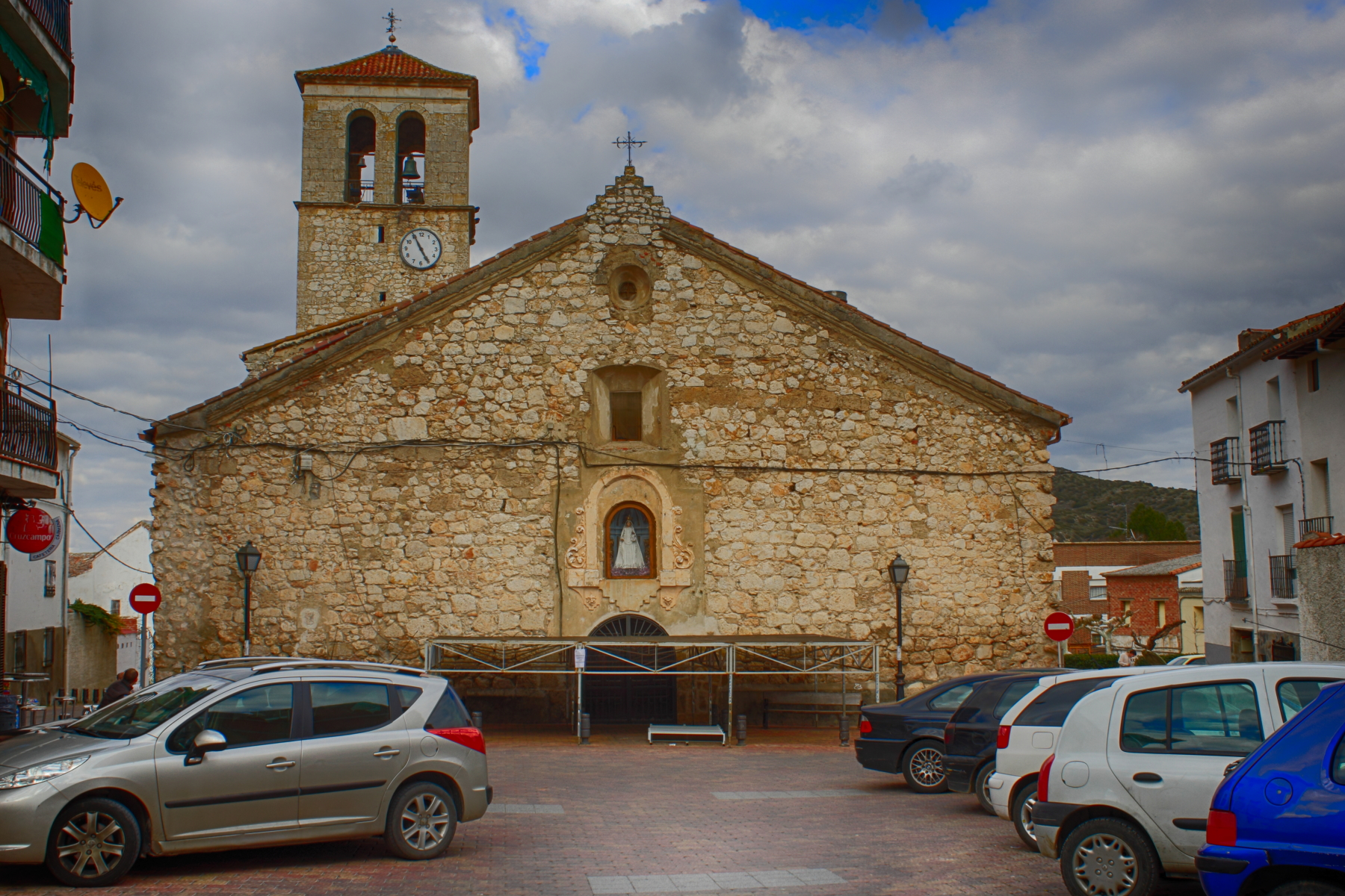 Iglesia Parroquial de la Asunción, construida en el siglo XVI. Está compuesta por una planta y tres naves divididas con arcos de medio punto sobre pilastras jónicas. Entre los vestigios que destacan están una pila bautismal visigoda y un sepulcro del siglo XVII. Carabaña Comunidad de Madrid España